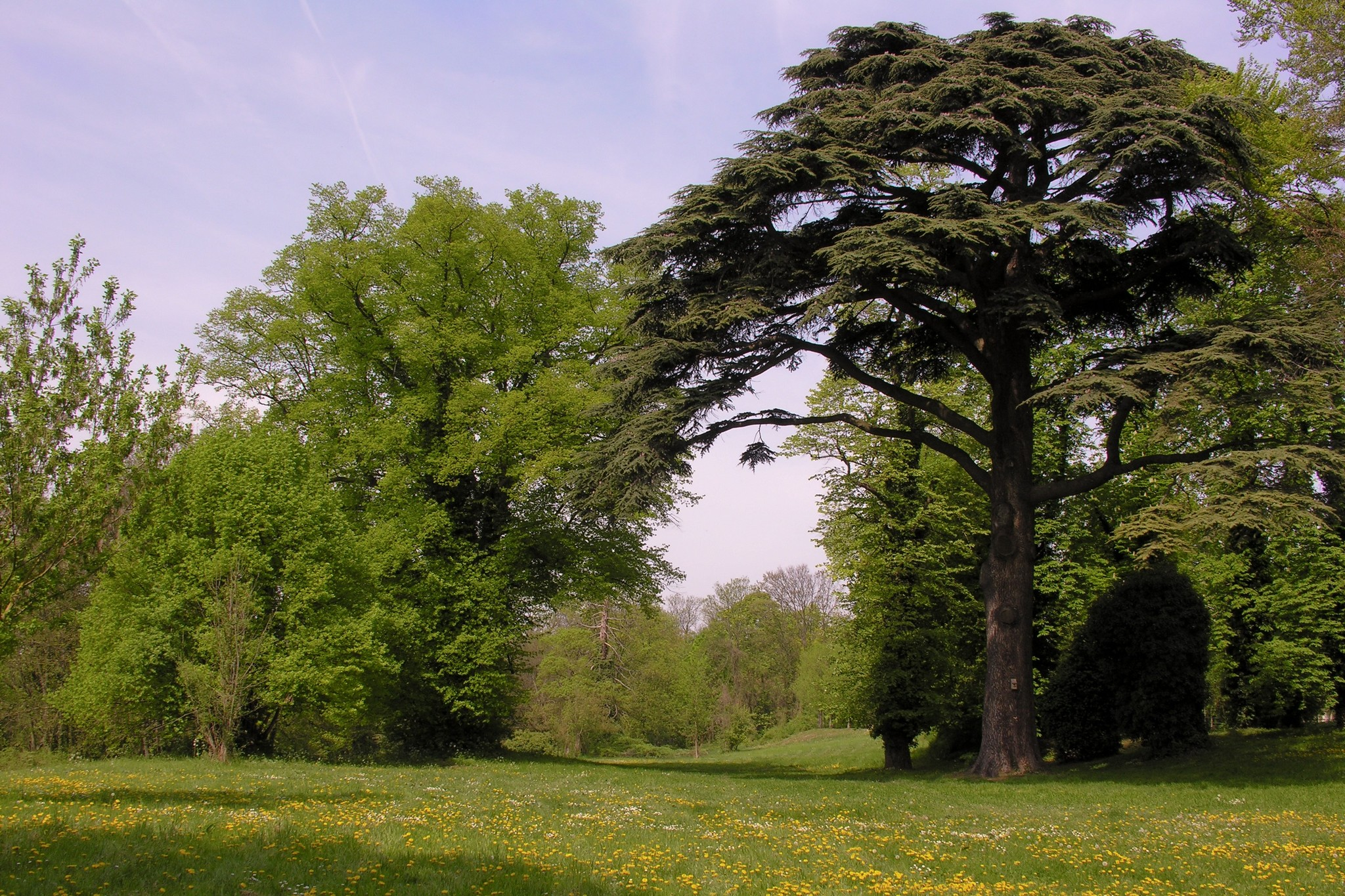 Domaine du château de Montjean à Wissous, France.